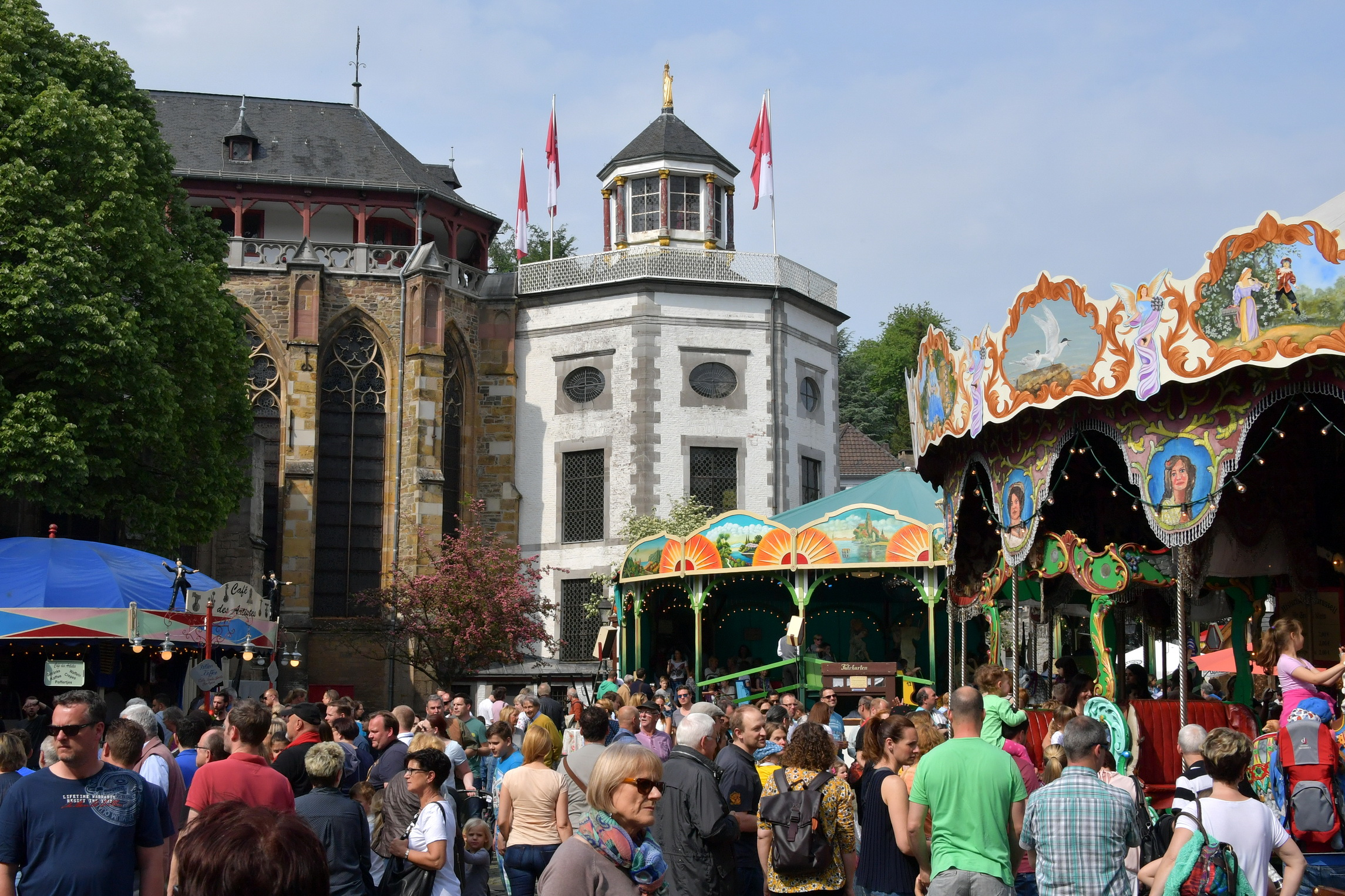 Historischer Jahrmarkt Kornelimünster 2016 Korneliusmarkt